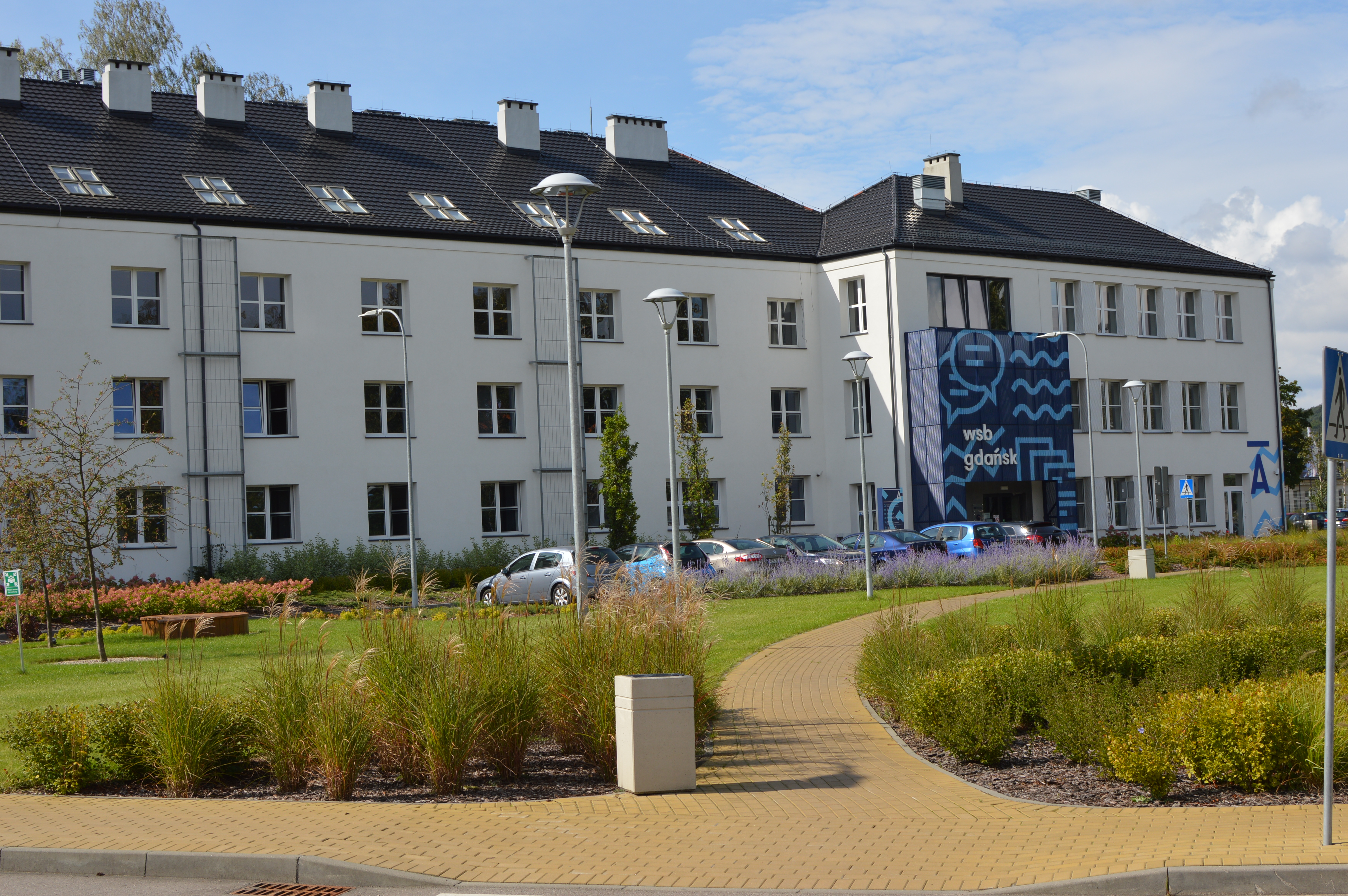 Budynek A kampusu Wyższej Szkoły Bankowej w Gdańsku